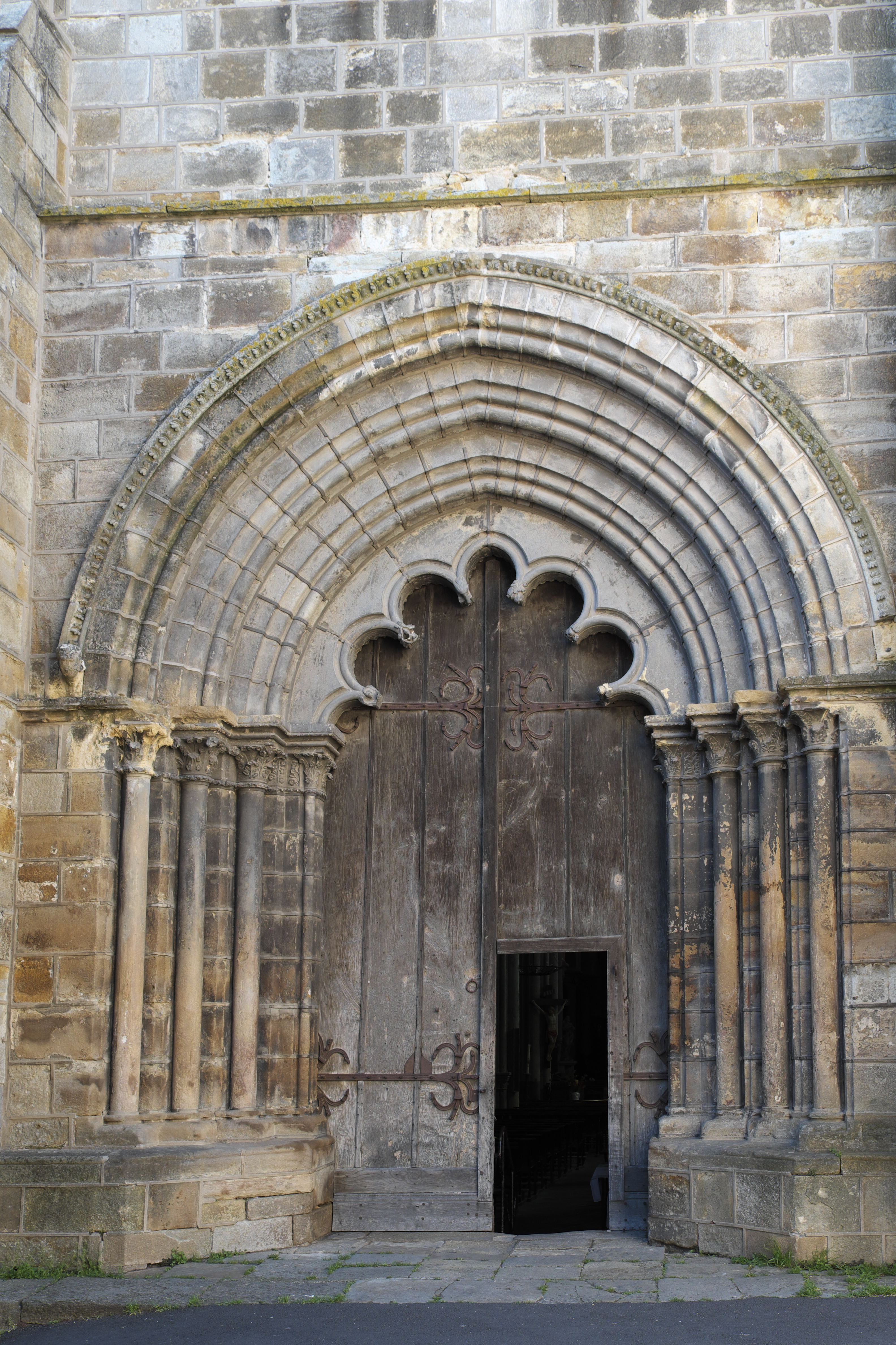 Katholische Pfarrkirche, ehemalige Stiftskirche, Saint-Cerneuf in Billom im Département Puy-de-Dôme (Auvergne-Rhône-Alpes), Portal